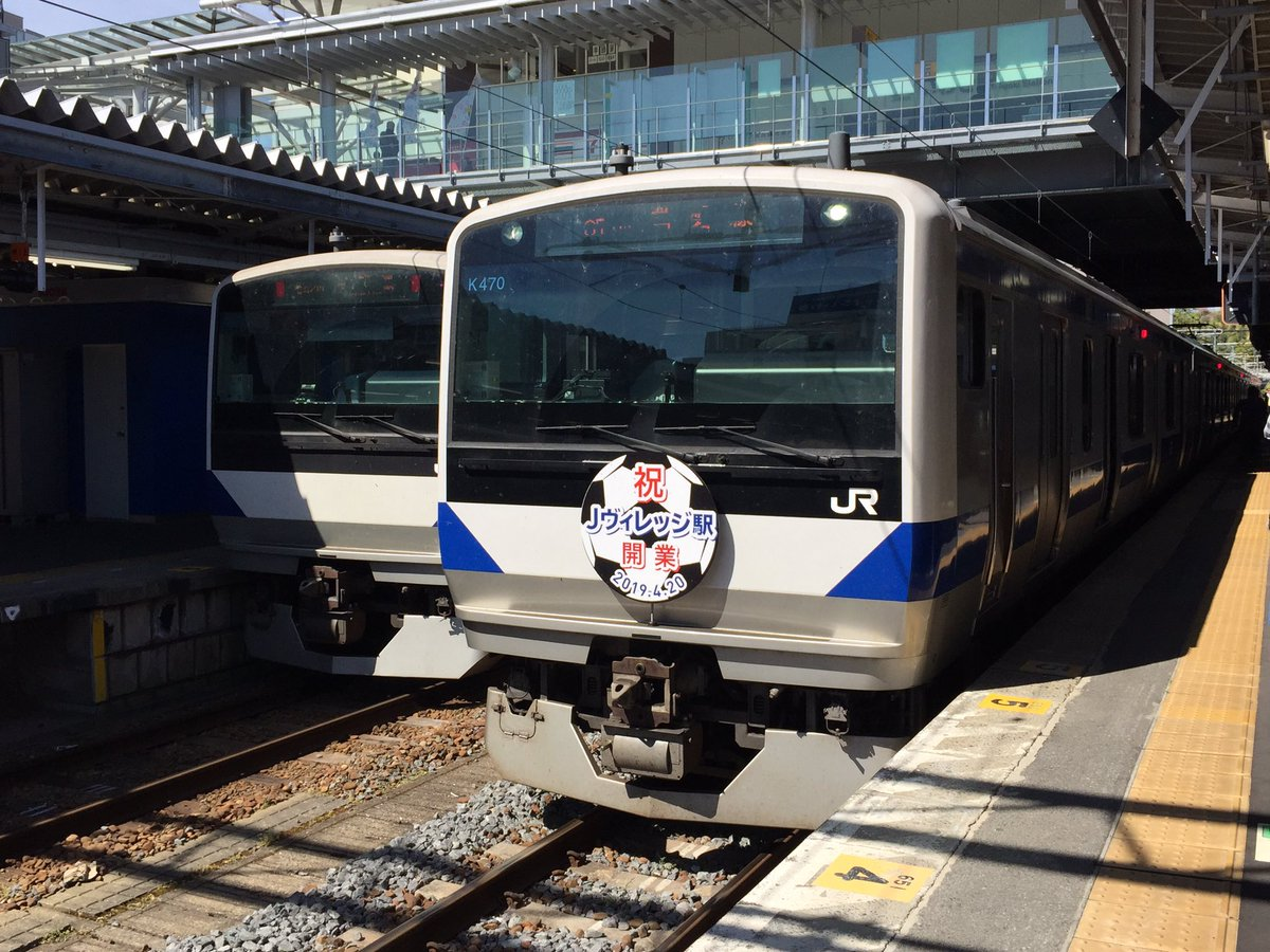 いわき駅で撮影